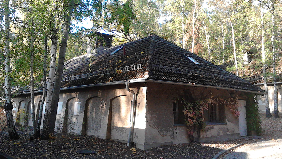 Hochbunker ehemaliges Reichsfilmarchiv in Potsdam-Babelsberg, Kohlhasenbrücker Straße